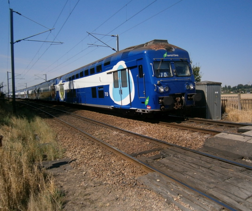 La rame VB 2N 7O roule sur la ligne de Saint-Cyr à Surdon, au passage à niveau n° 24, à Richebourg (78). Elle assure une mission Transilien N, de Dreux à Paris-Montparnasse.